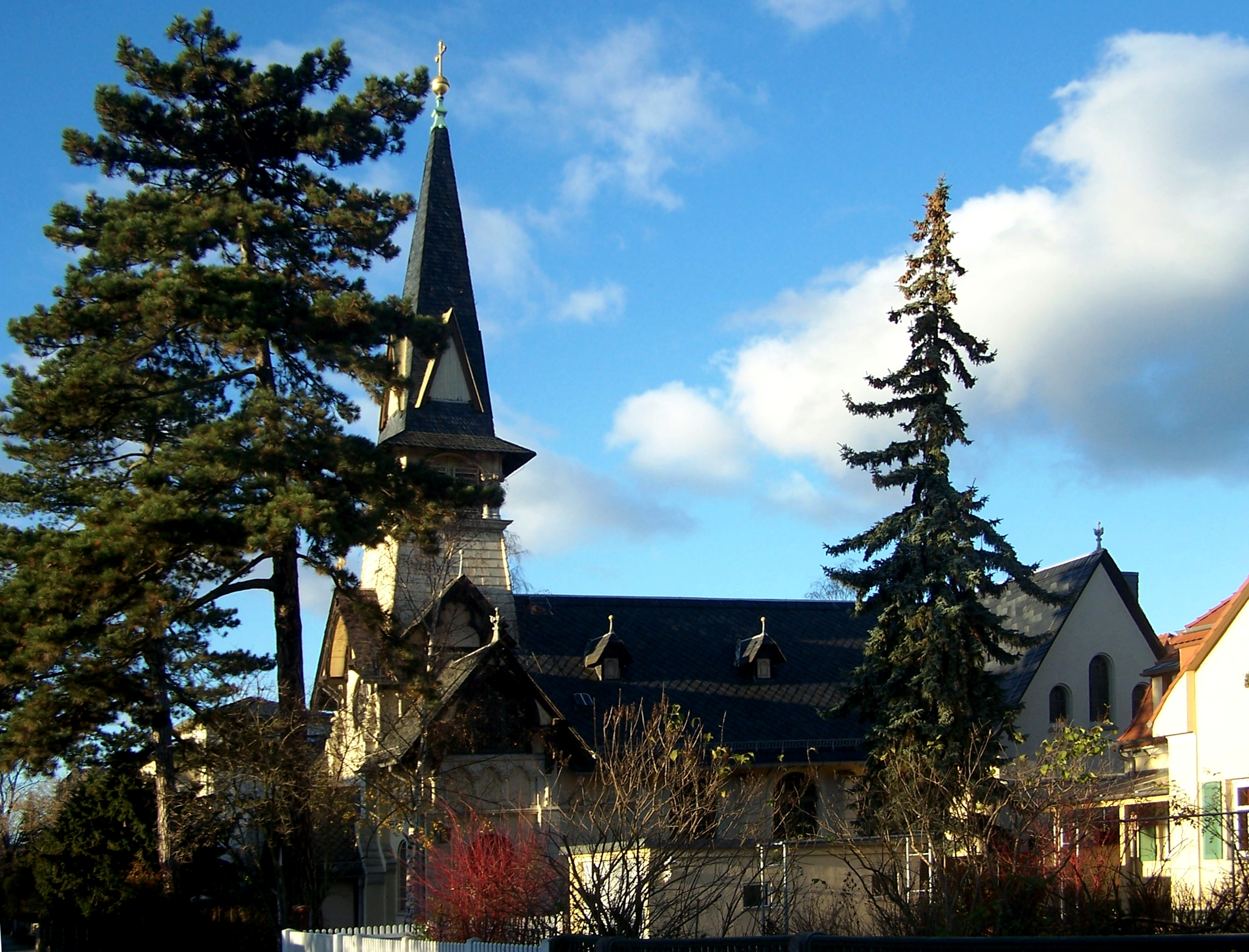 Dresden, evangelische Kirche Weißer Hirsch